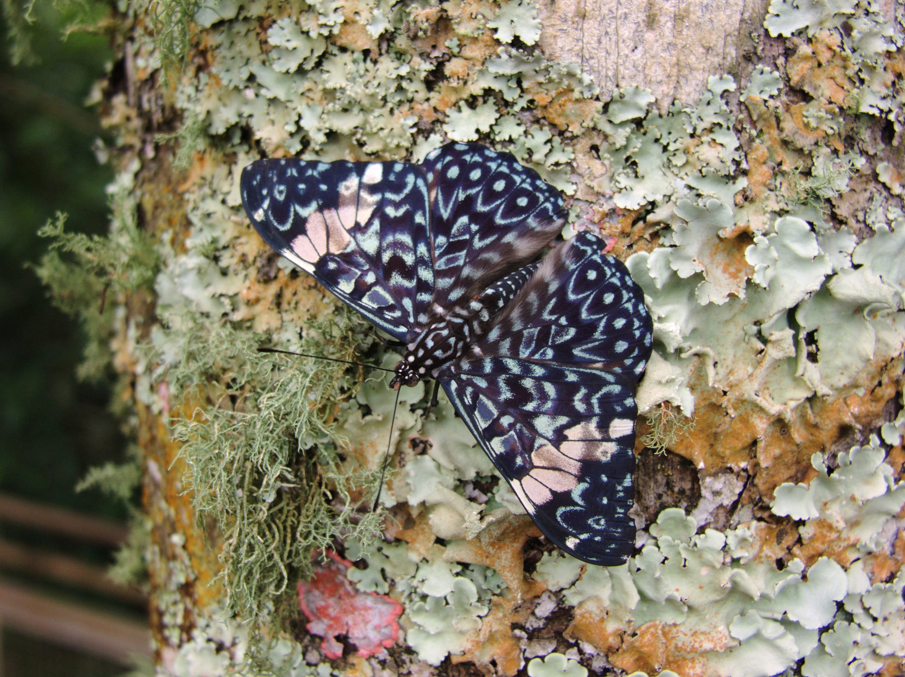 Hamadryas amphinome (Nymphalidade, Biblidinae), Foz do Iguaçu, Brasil.